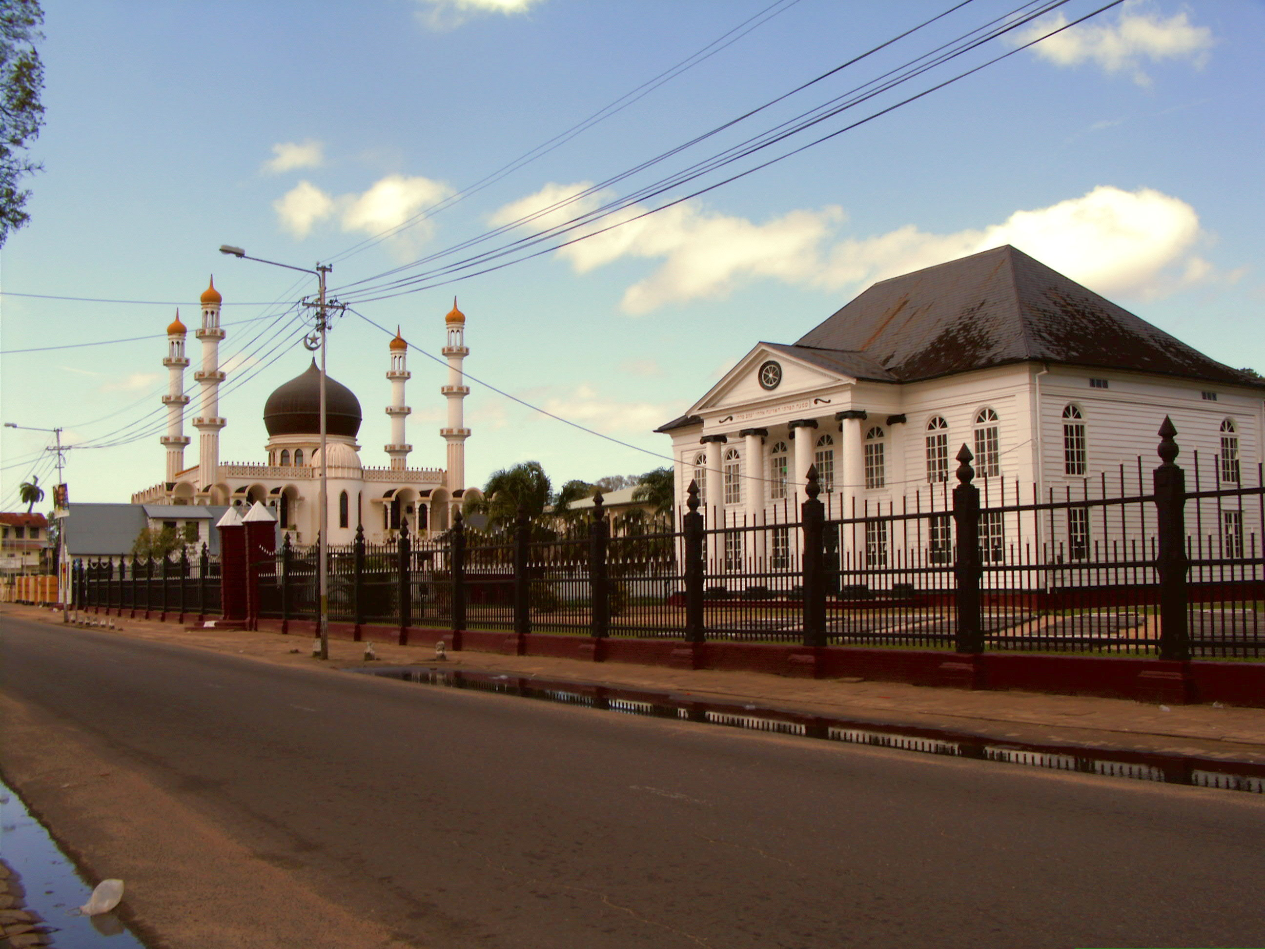 Moschee und Synagoge in Paramaribo, Suriname.